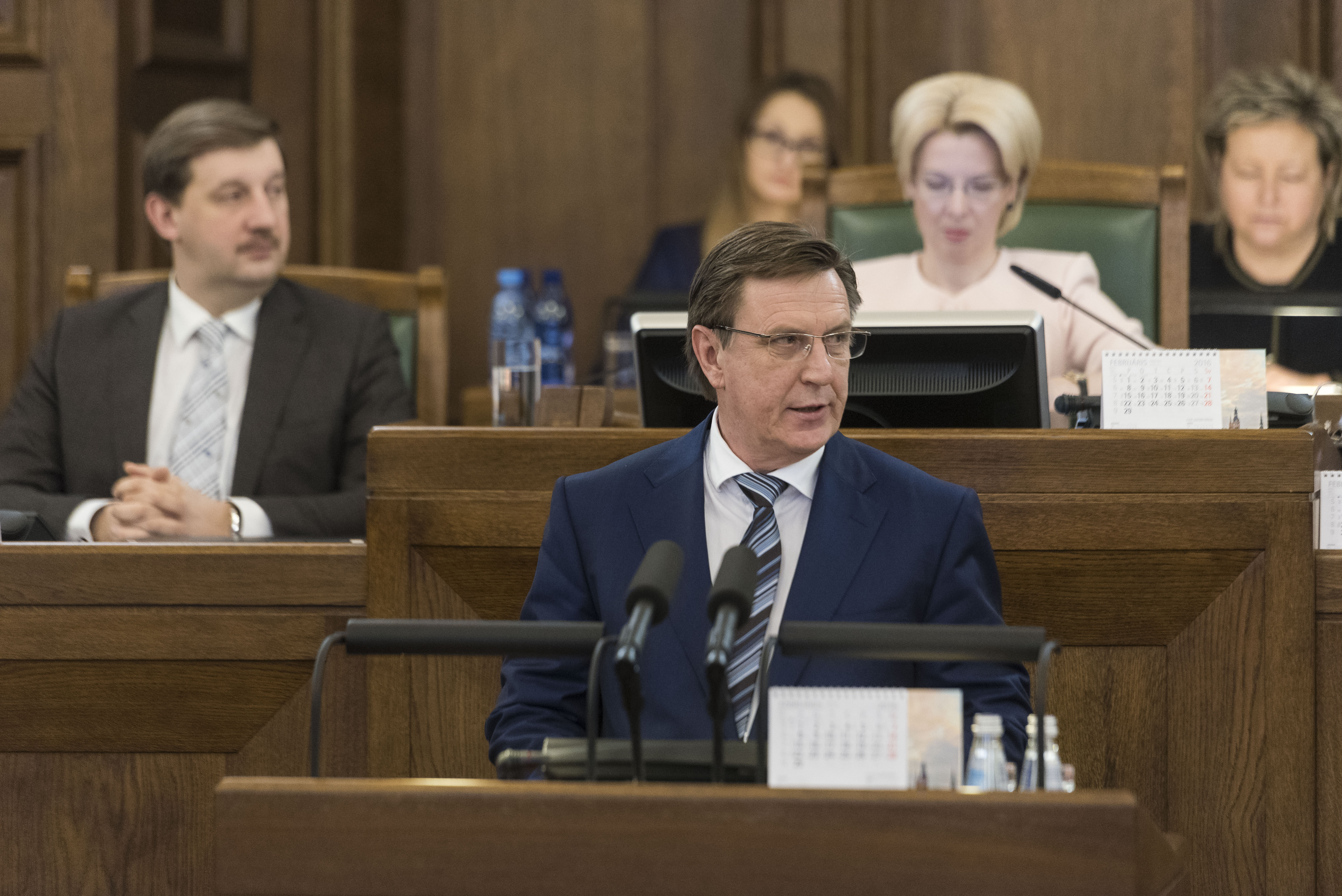 2016.gada 11.februāris. Māra Kučinska valdības apstiprināšana Saeimas ārkārtas sēdē. Foto: Reinis Inkēns, Saeimas Administrācija Izmantošanas noteikumi: saeima.lv/lv/autortiesibas